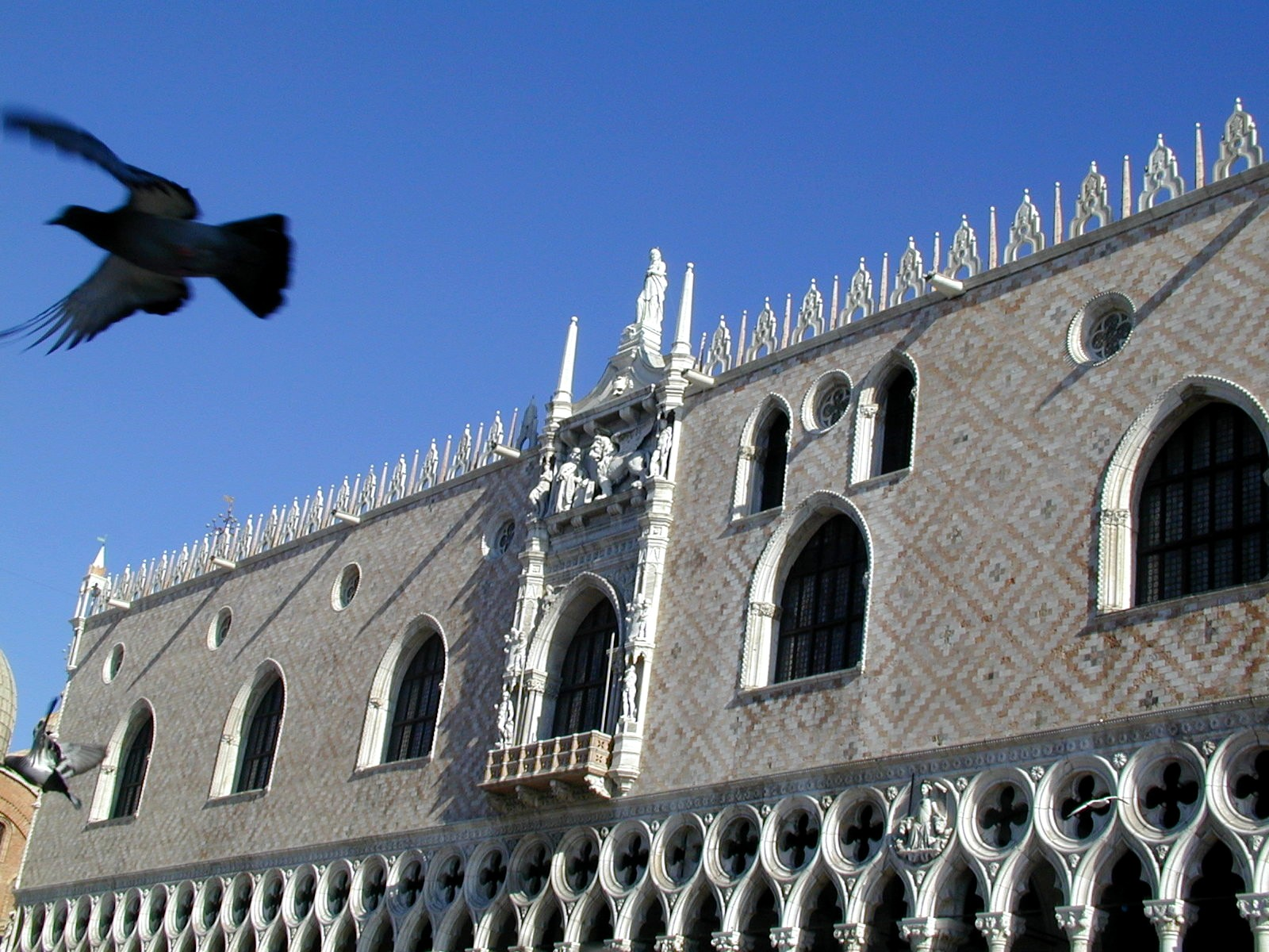 Venezia - Palazzo Ducale, facciata